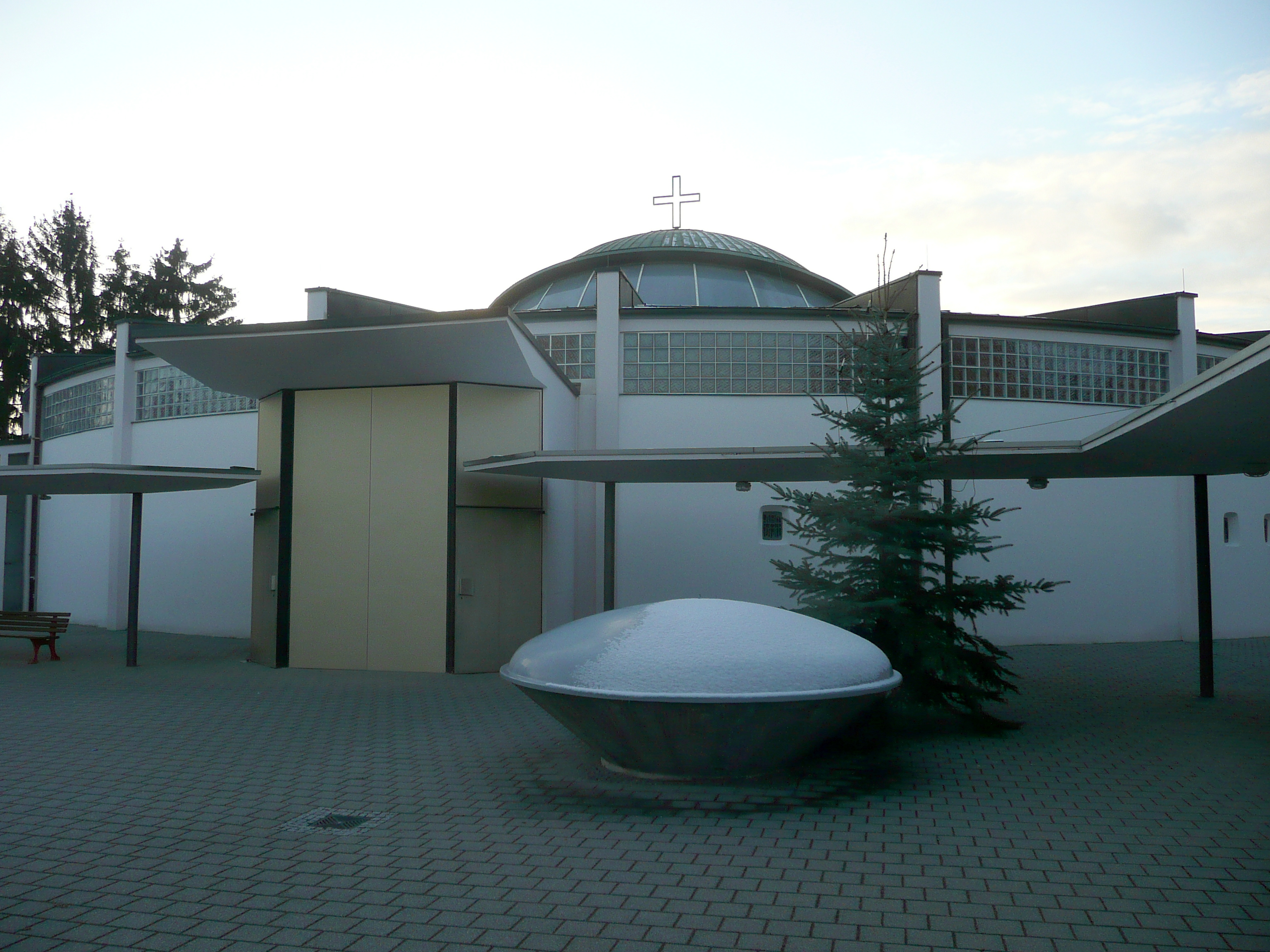 Katholische St.-Andreas-Kirche in Neckarhausen (Ortsteil Edingen-Neckarhausen, Baden-Württemberg, Deutschland)